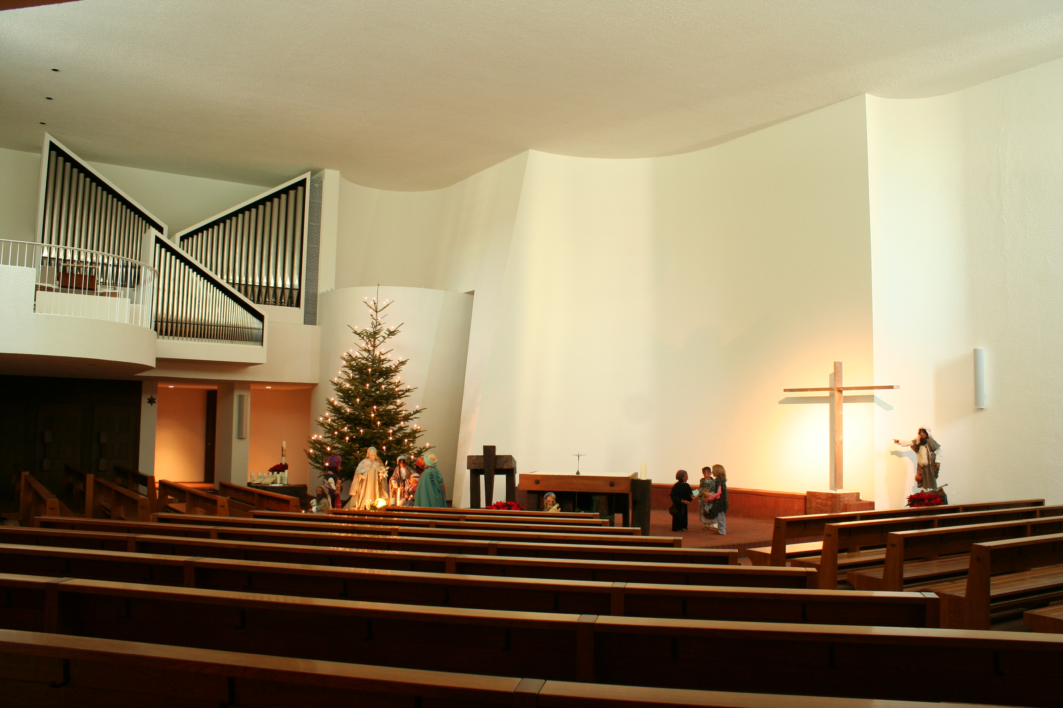 Römisch-katholische Pfarrkirche St. Ulrich Winterthur-Rosenberg, Werk von Ro Studer-Koch, Altarraum